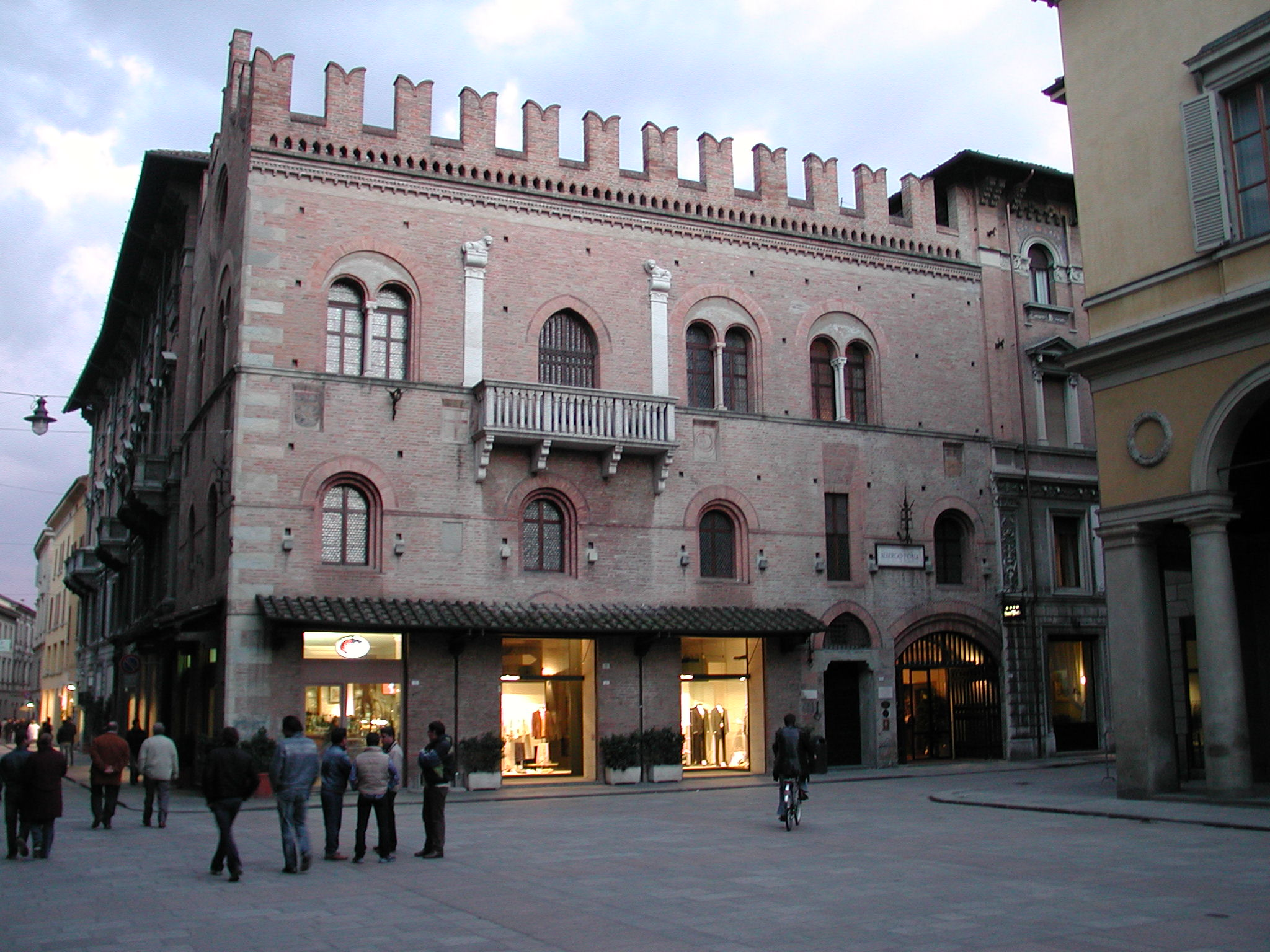 Reggio Emilia, Italy: Piazza del Monte e palazzo del Capitano del Popolo - palaces of Reggio Emilia